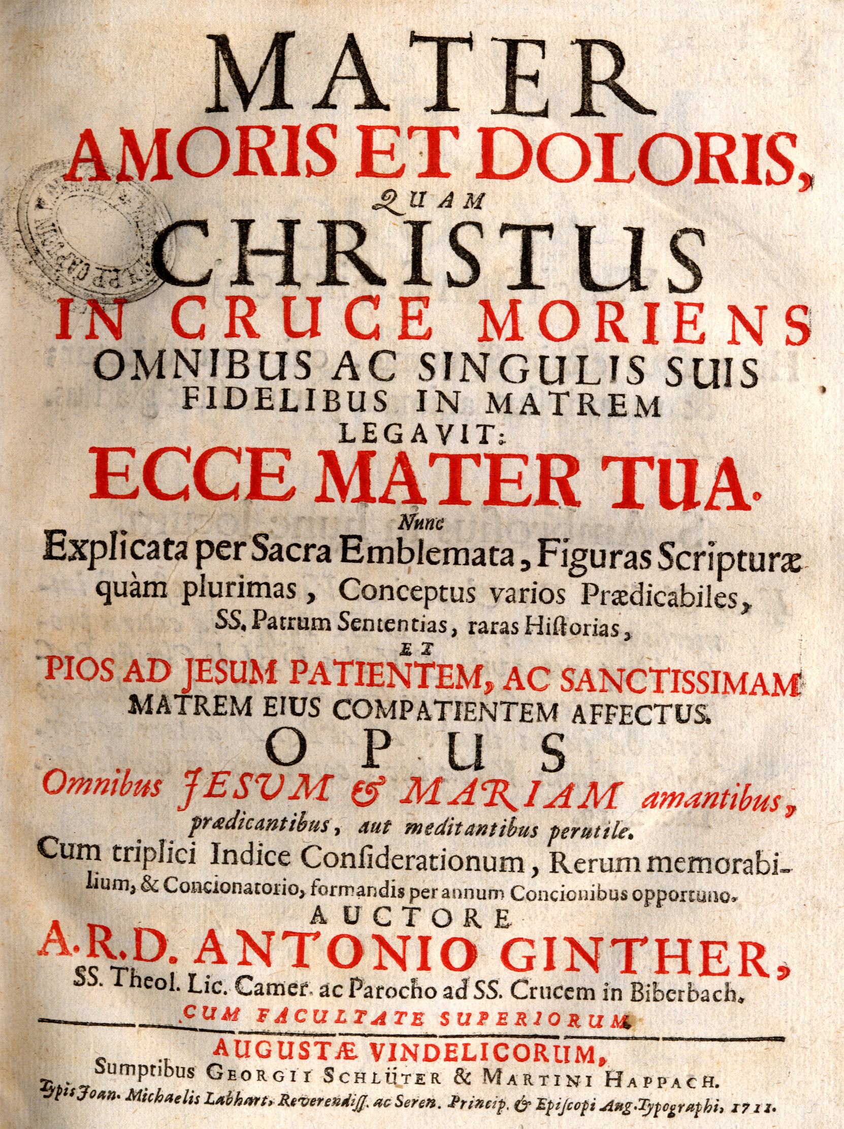 Titelblatt aus u.g. Werk.